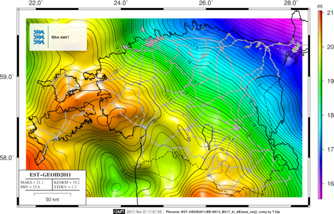 Eesti geoidi mudel